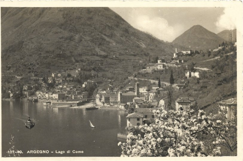 Argegno - Lago di Como